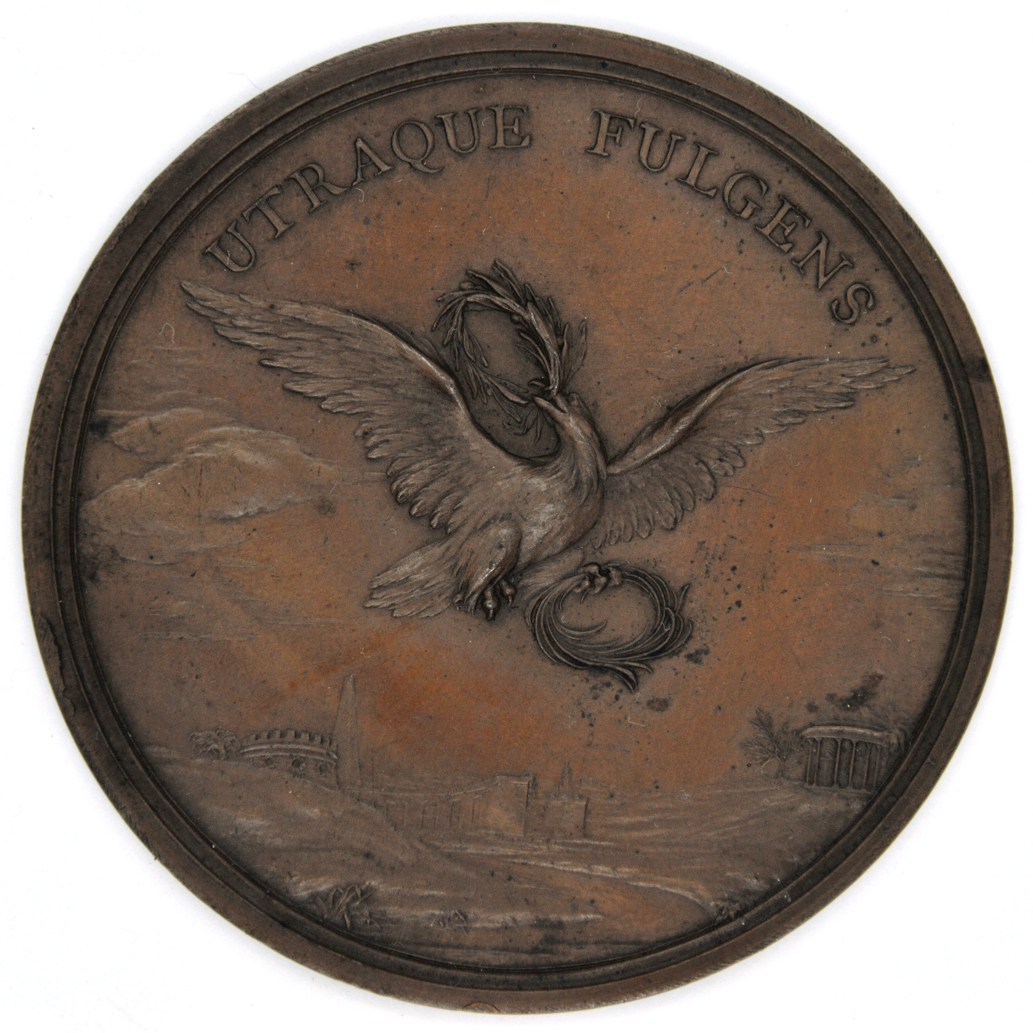 Médaille de Jean-Charles Hedlinger, médailleur suisse, décrite dans Explication des médailles du Chevalier Hedlinger par Chrétien de Méchel en 1778 comme « Un aigle qui plane dans les airs, tenant dans son bec une couronne de laurier, et dans un de ses serres une couronne de palmier. Au bas l'on voit un rivière qui coule entre deux collines ; sur la colline à gauche le temple de la Paix entre un palmier et un laurier. Dans le lointain paraissent quelques édifices d'une architecture antique. Pour légende ; UTRAQUE FULGENS [c'est à dire] Brillant par l'une et par l'autre. ». La médaille photographiée n'avait pas de revers ; cependant, cette face est décrite comme le revers d'une médaille dans l'ouvrage de Méchel.. This photo of movable heritage has been taken in the Walloon Region